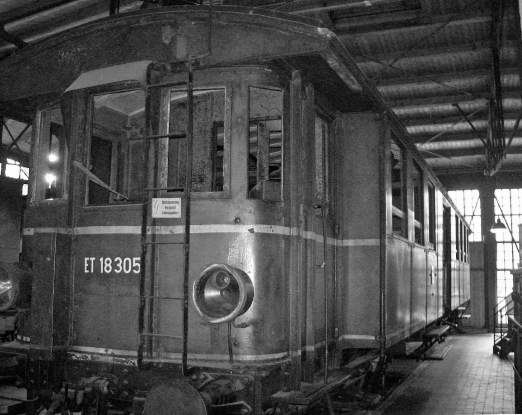 MAN Elektrischer Lokalbahntriebwagen 505 (später ET 18 305) aus dem Jahr 1898 der Lokalbahn Aktien-Gesellschaft (LAG) in München. Eingesetzt wurde er bis 1949 unter anderen auf der Isartalbahnstrecke in München.